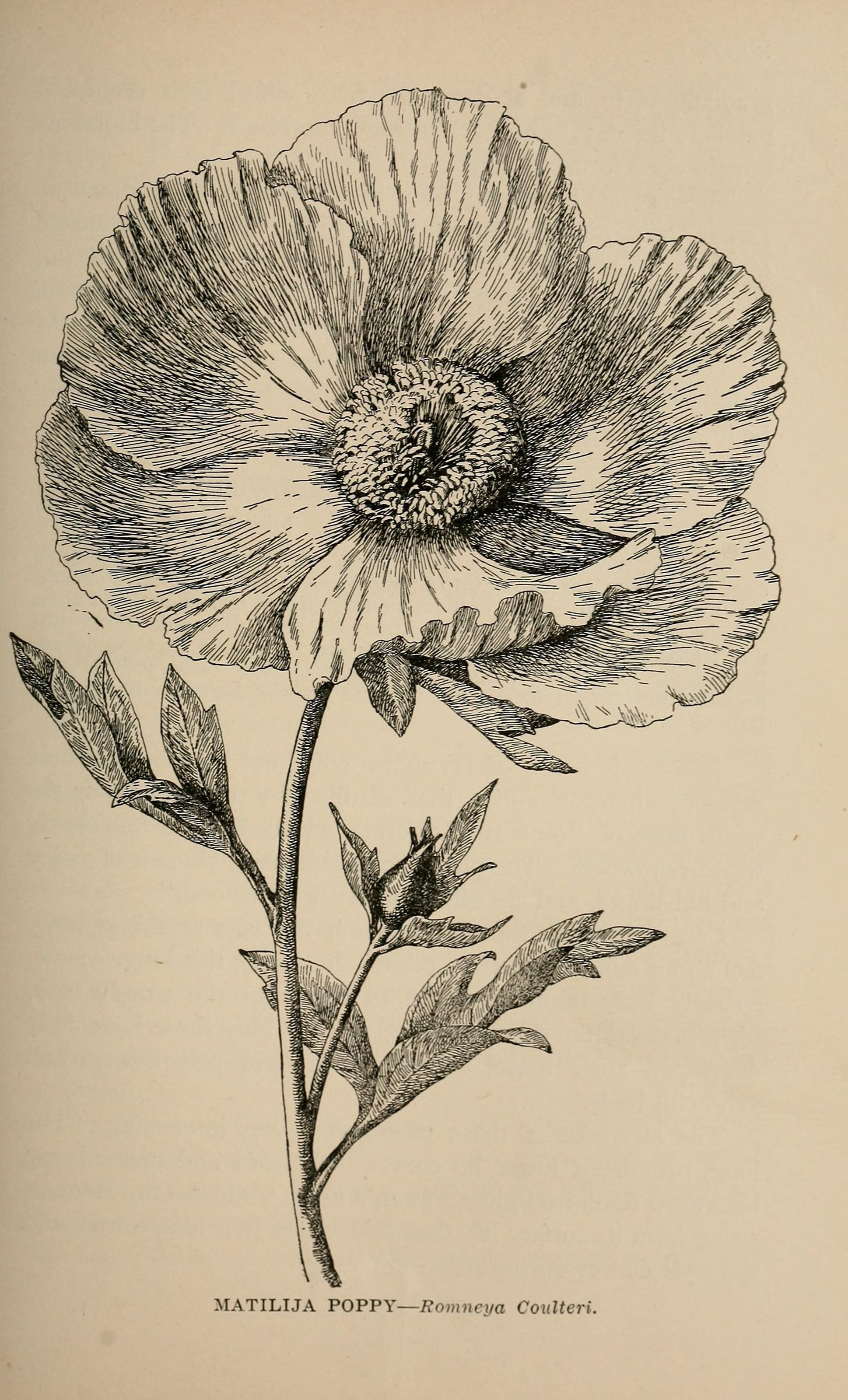 MATILIJA POPPY — Romncya Coulteri.